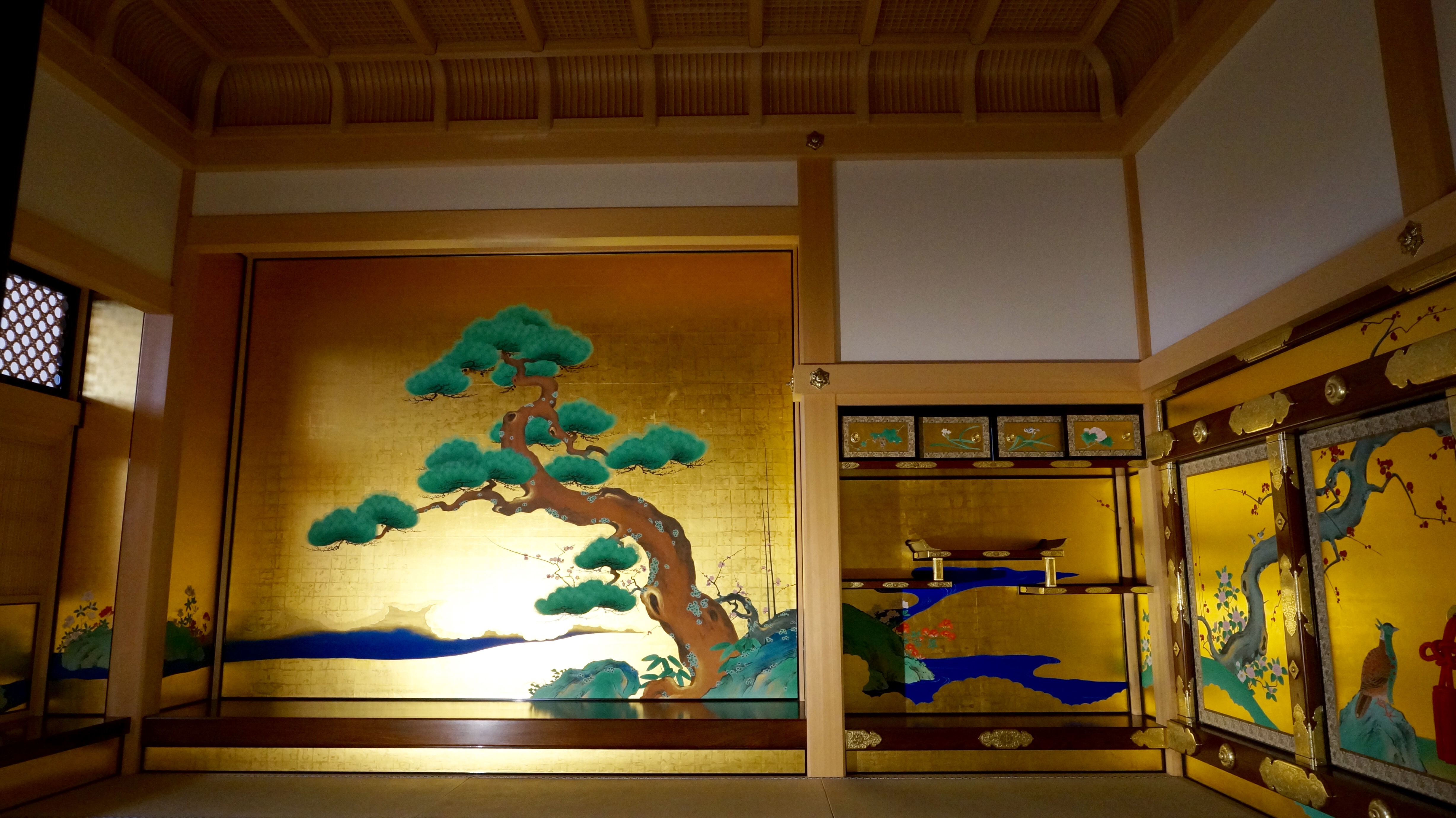 名古屋城 本丸御殿（復元） 表書院 上段之間